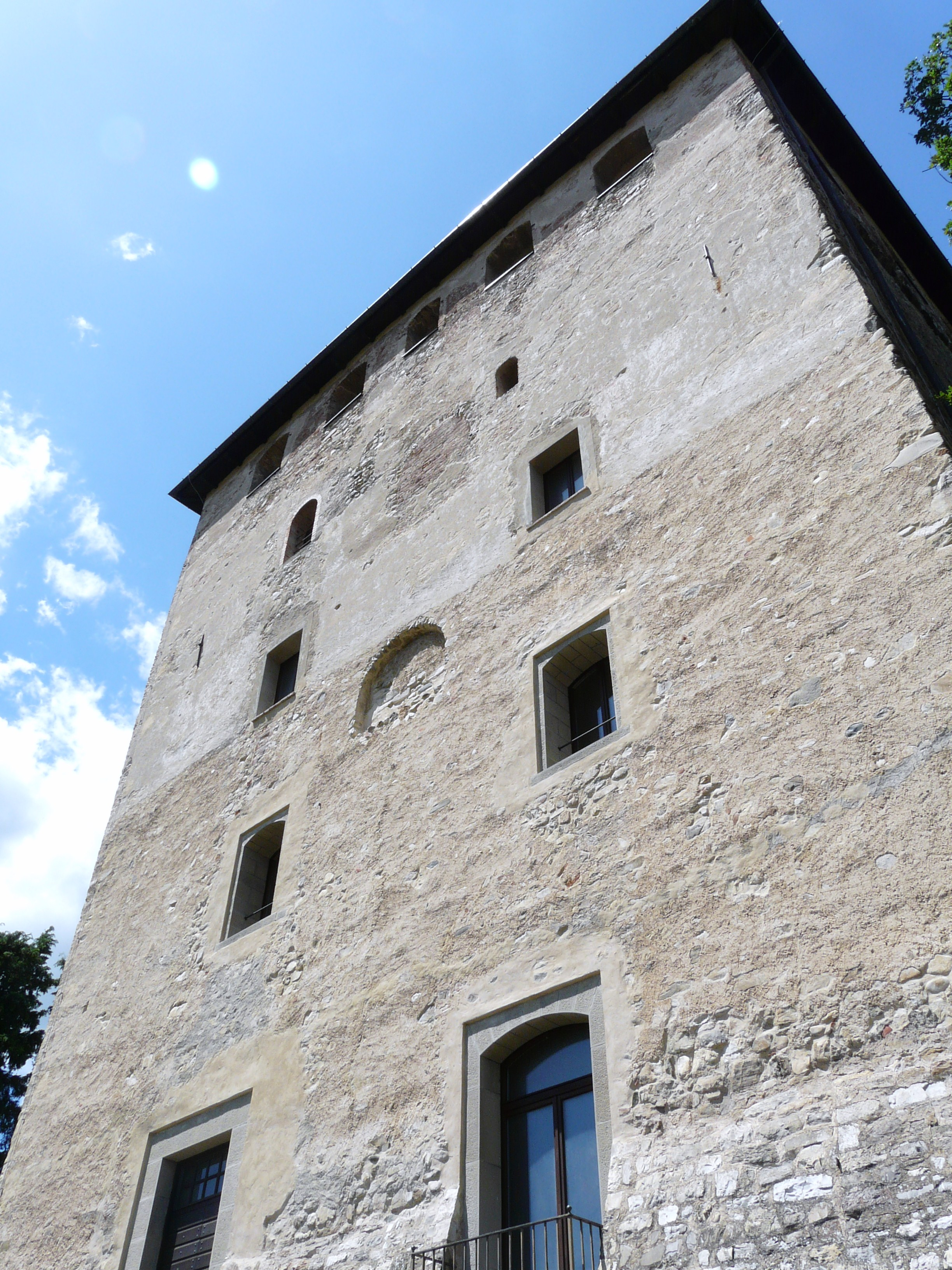 Immagini del castello malaspiniano di Bobbio, Emilia-Romagna, Italia